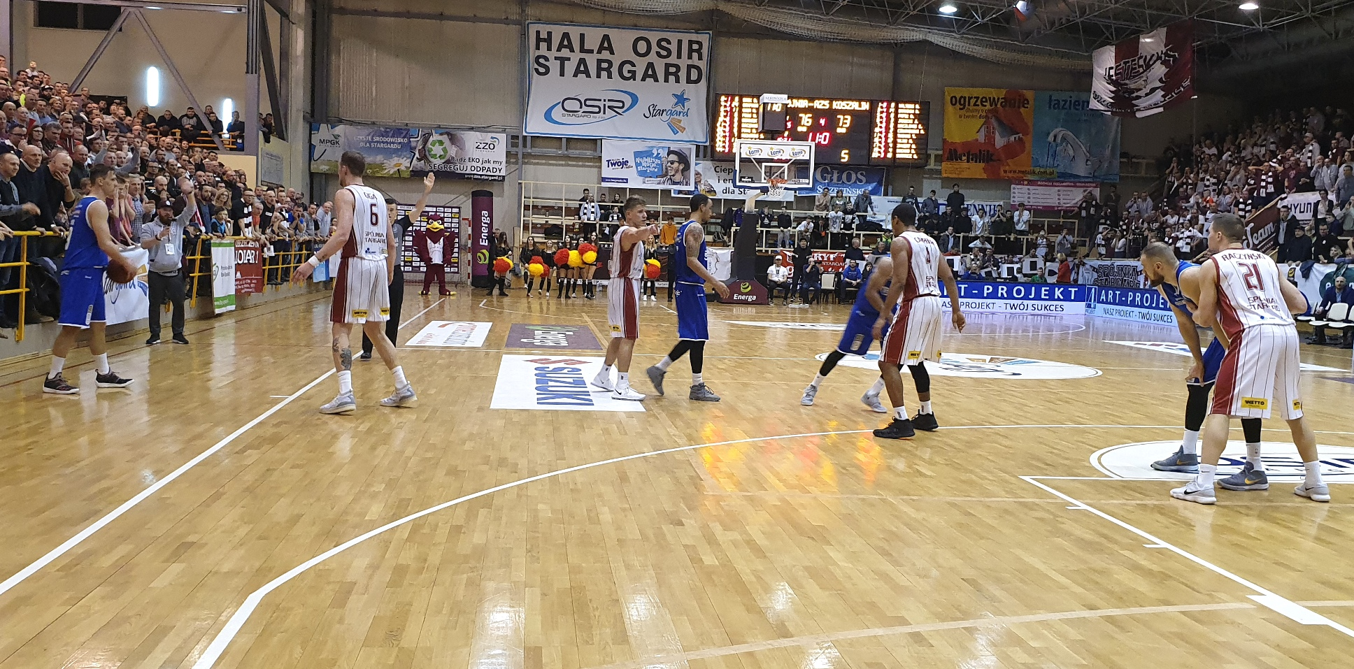 Derby. Spójnia - AZS Koszalin